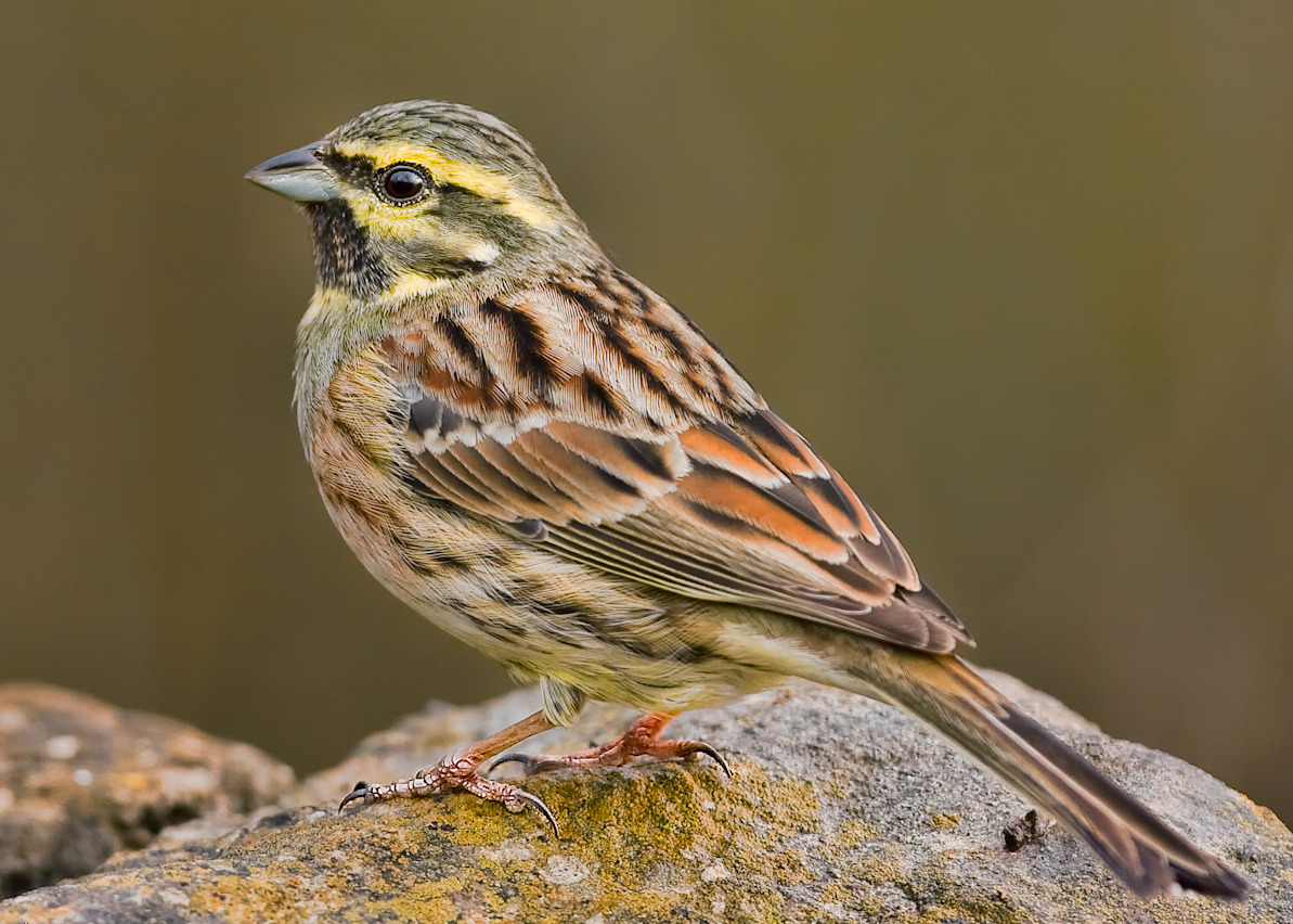 Male Cirl Bunting, Emberiza cirlus, Ayódar, Valencia, Spain